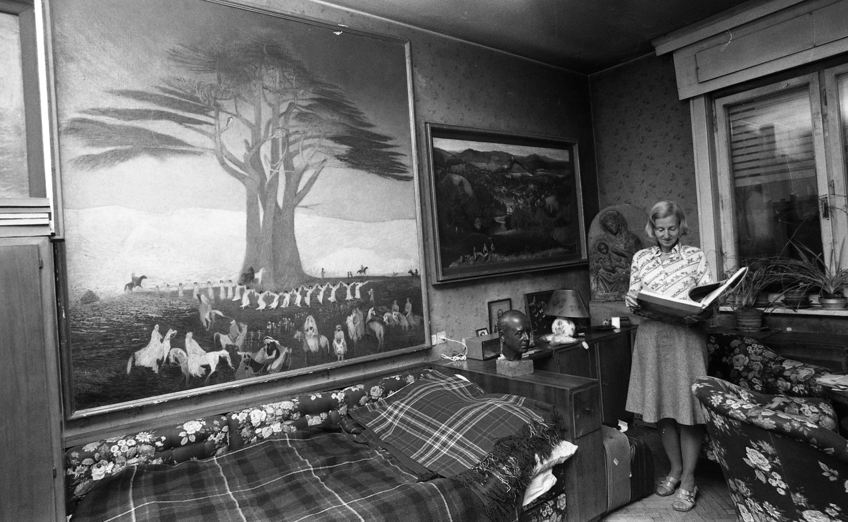 Galamb utca 3., Gerlóczy Gedeon építész lakása. Csontváry Kosztka Tivadar festményei: Zarándoklás a cédrusokhoz Libanonban (1907) és Selmecbánya látképe (1902). Location: Hungary, Budapest V. Tags: Budapest Title: Galamb utca 3., Gerlóczy Gedeon építész lakása. Csontváry Kosztka Tivadar festményei: Zarándoklás a cédrusokhoz Libanonban (1907) és Selmecbánya látképe (1902).